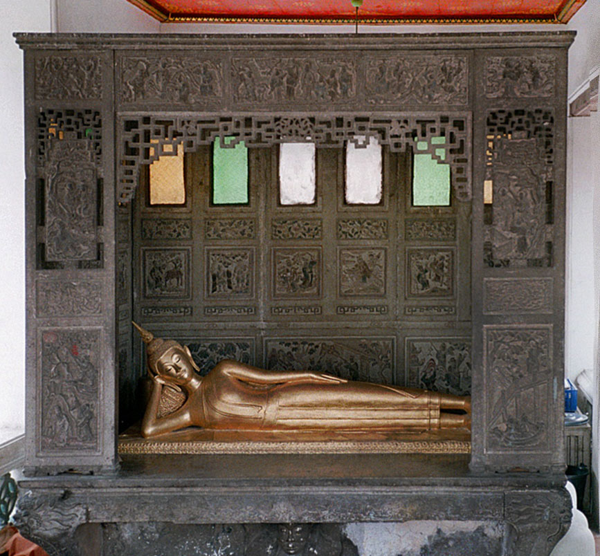 Reclining Buddha, Wat Suthat, Bangkok, Thailand